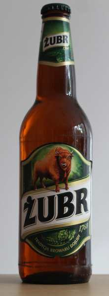 Zdjęcie butelki piwa Żubr, maj 2016